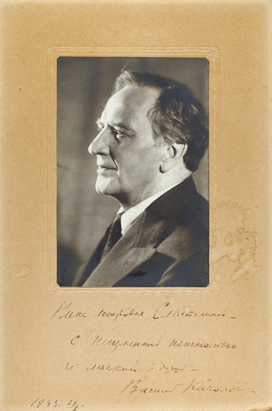 Автограф В. И. Качалова: "Нине Иосифовне Сластениной - с неизменной нежностью и лаской в душе - Василий Качалов".